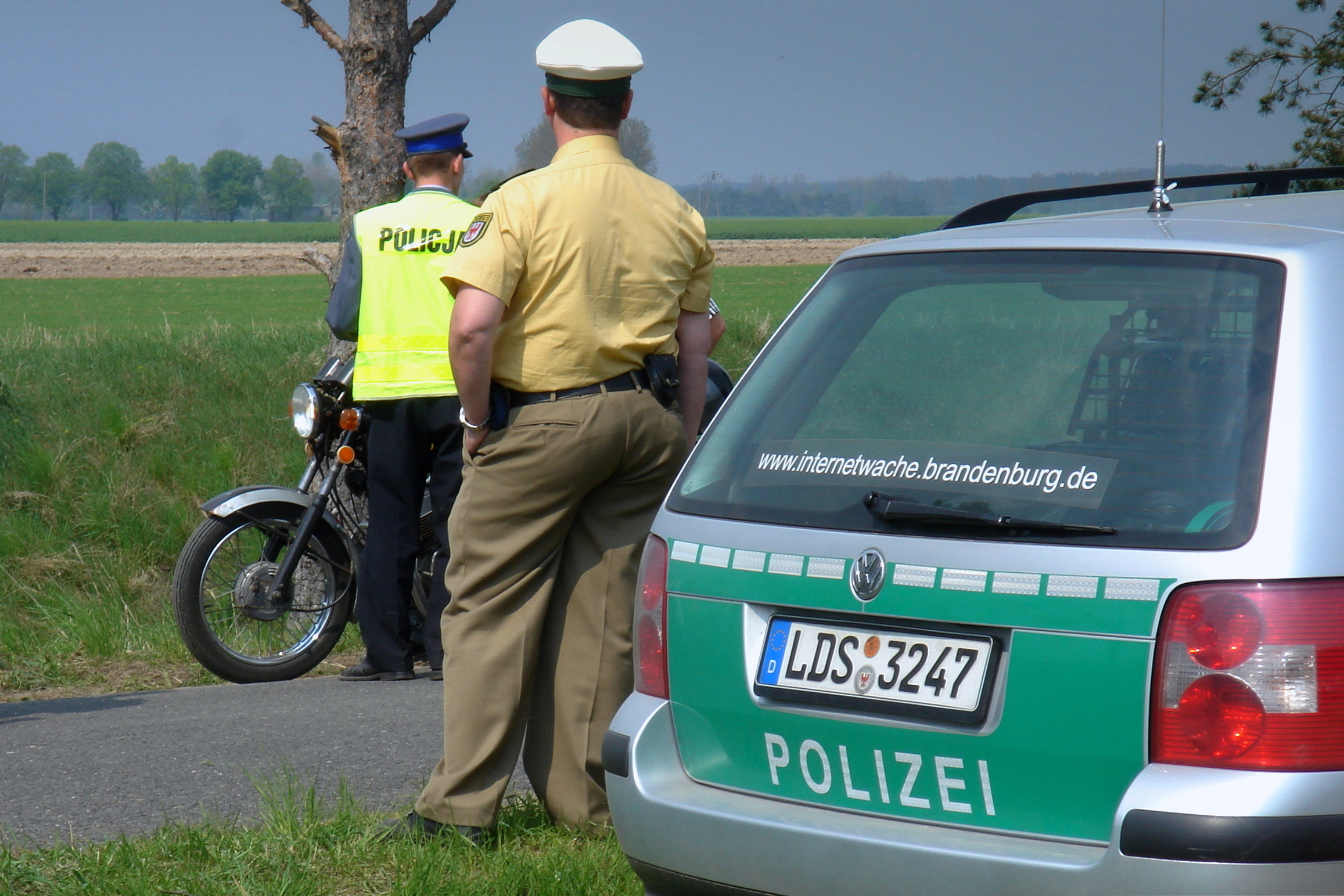 Polsko-niemiecki patrol policyjny w województwie lubuskim podczas imprezy masowej (piknik militarny w Boryszynie, pow. Świebodziński)